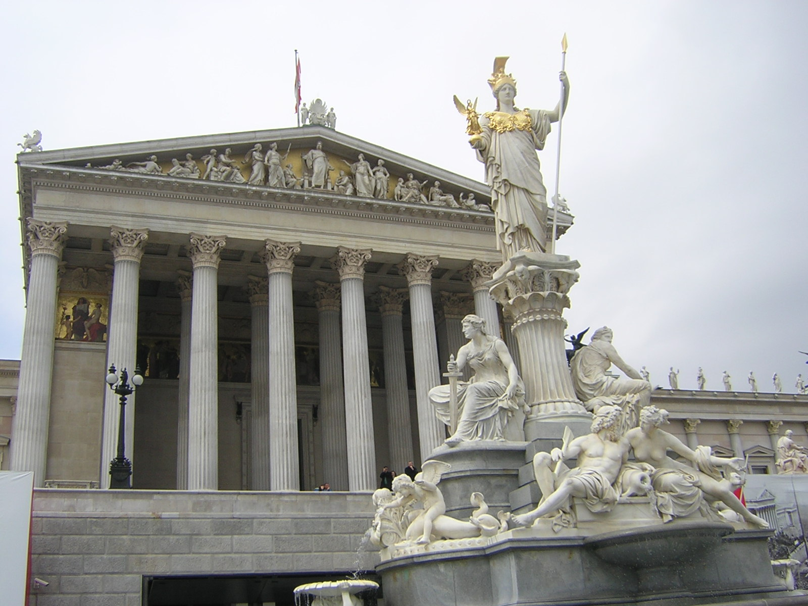 Austrijski parlament na Karl-Rene Ringu u Beču